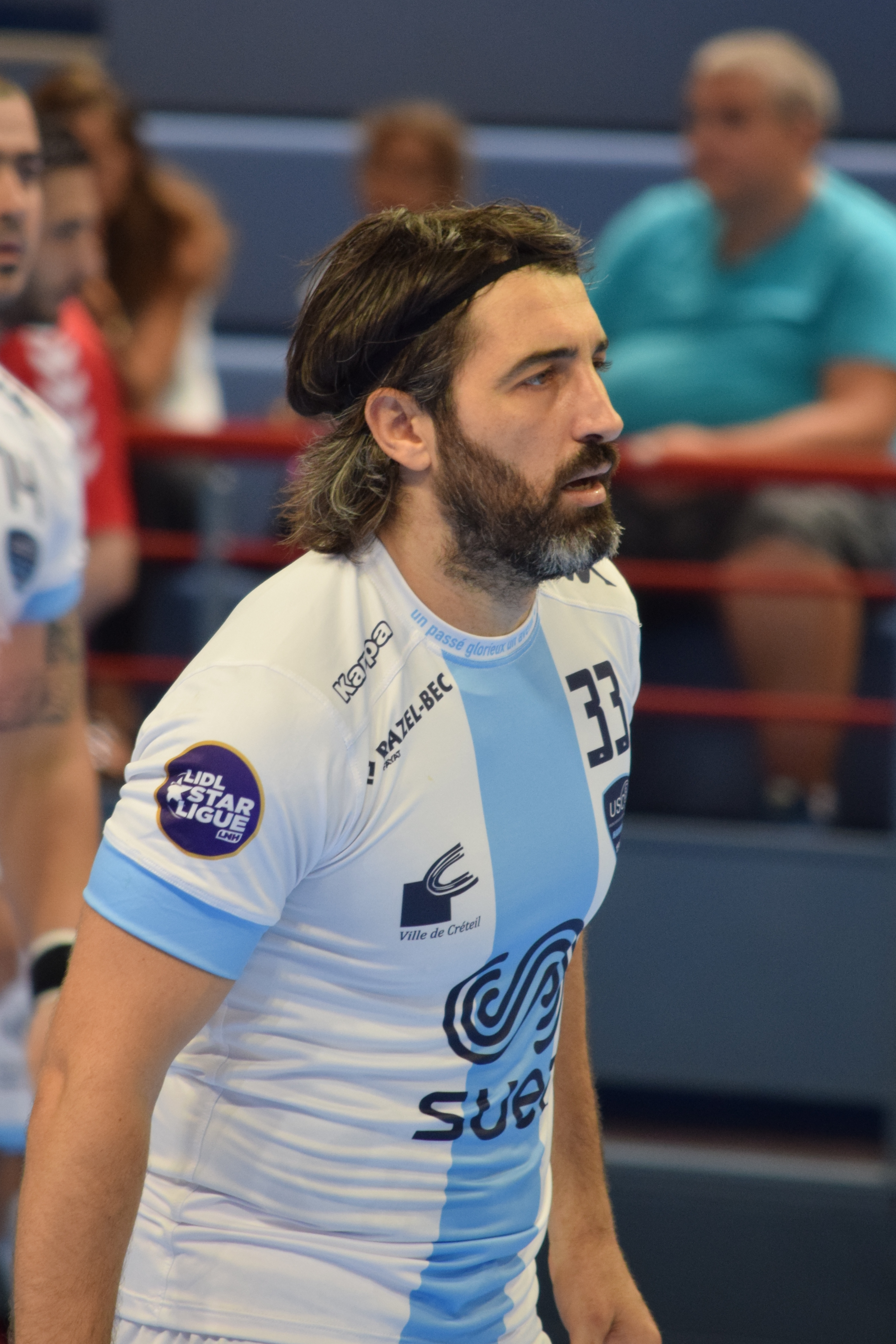 Match aller du premier tour de la coupe européenne EHF. Défaite de Créteil à domicile 29 - 32